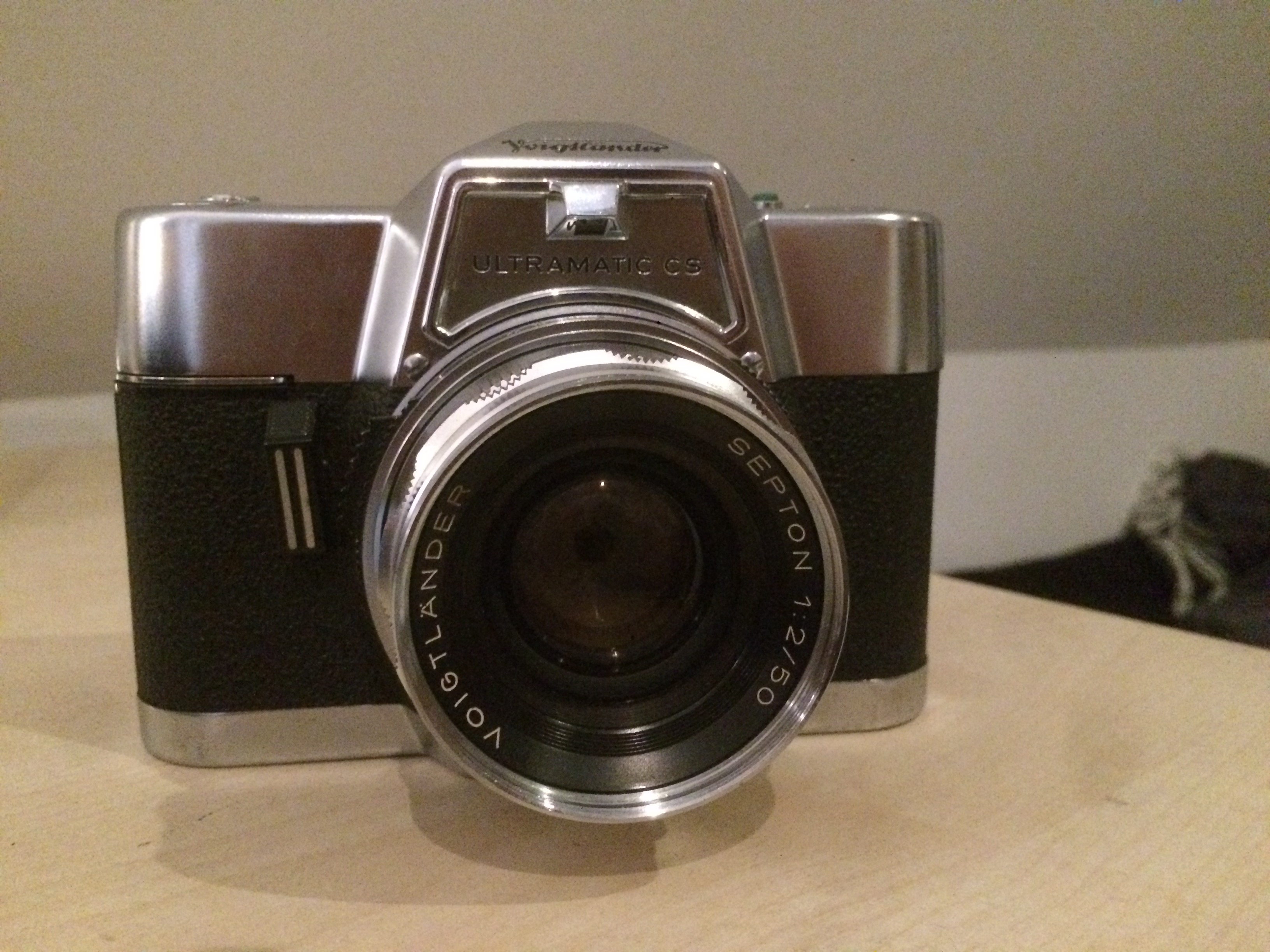 Voigtländer Ultramitic CS (1966)